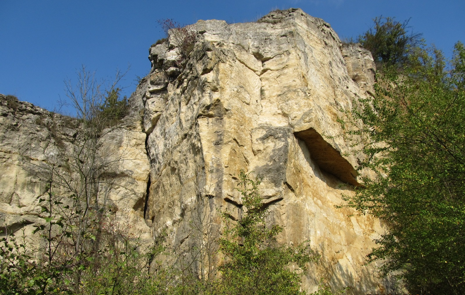 Geologické podloží - vápnitý pískovec